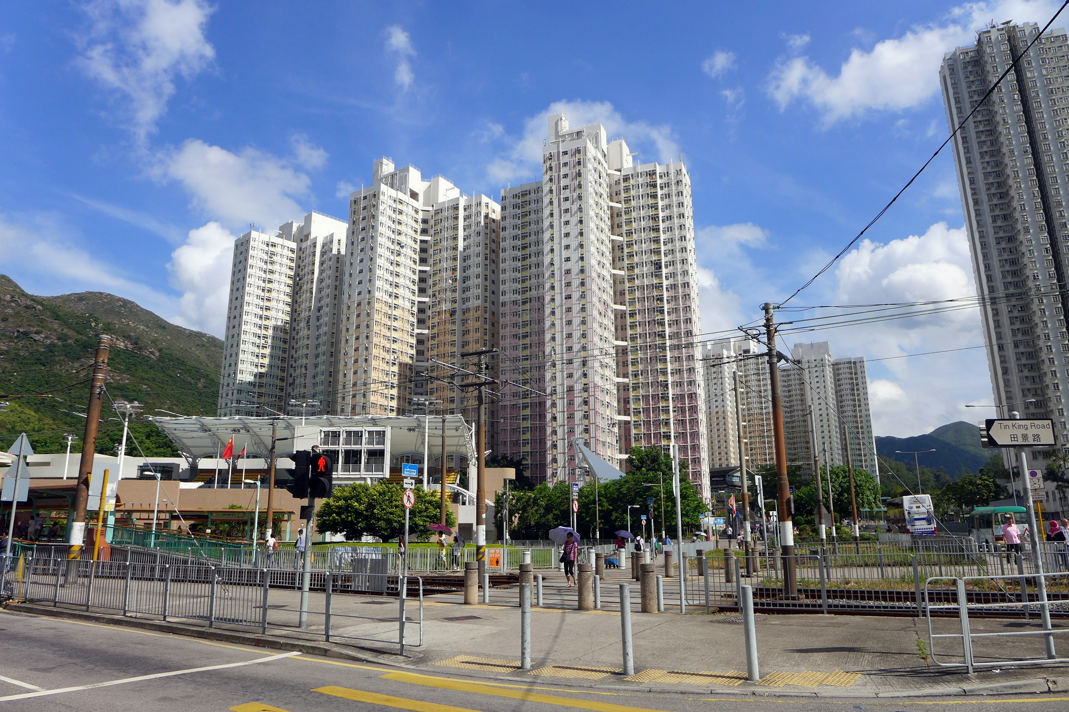 Po Tin Estate